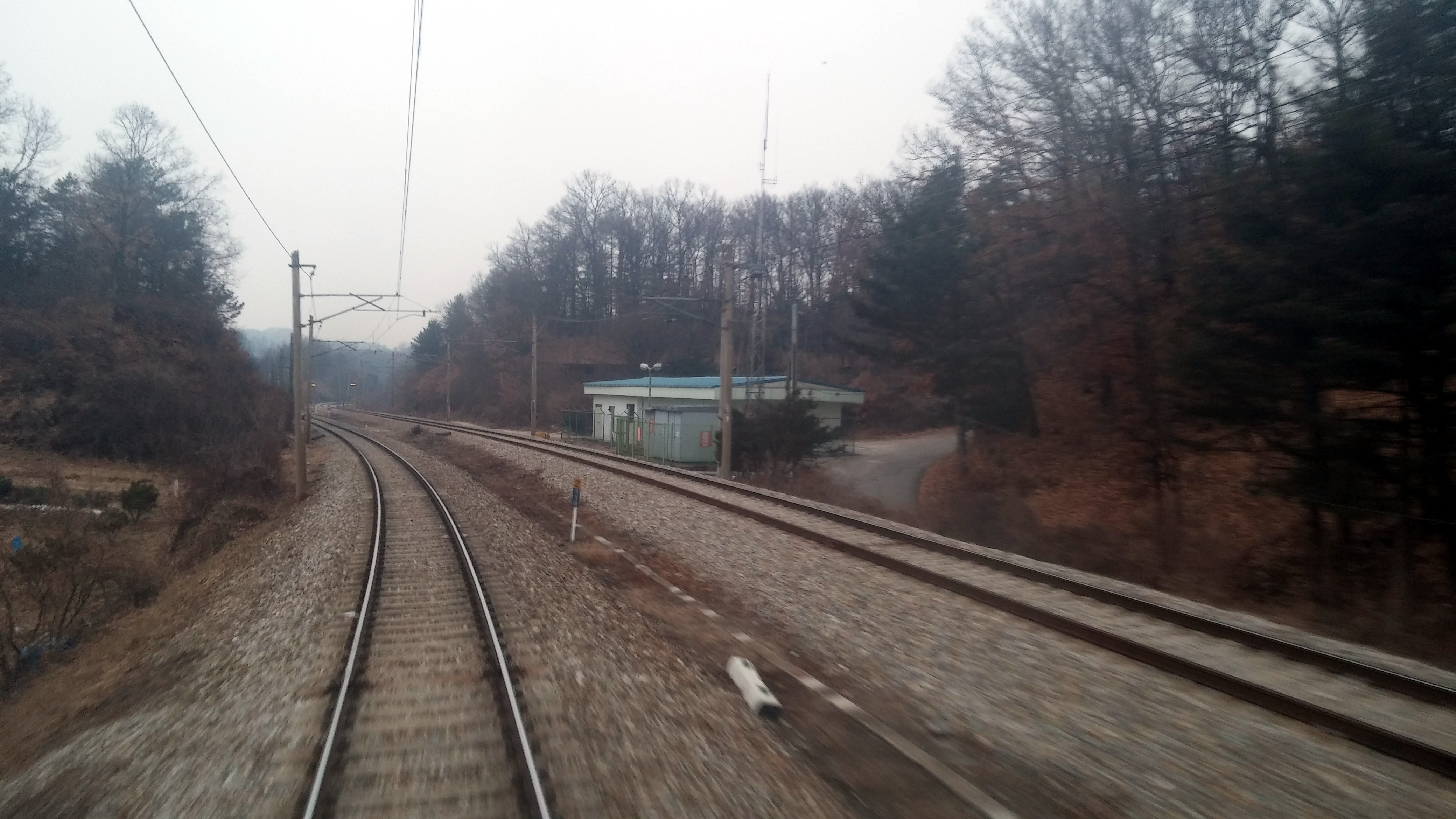 한국철도공사 유교역 구내.